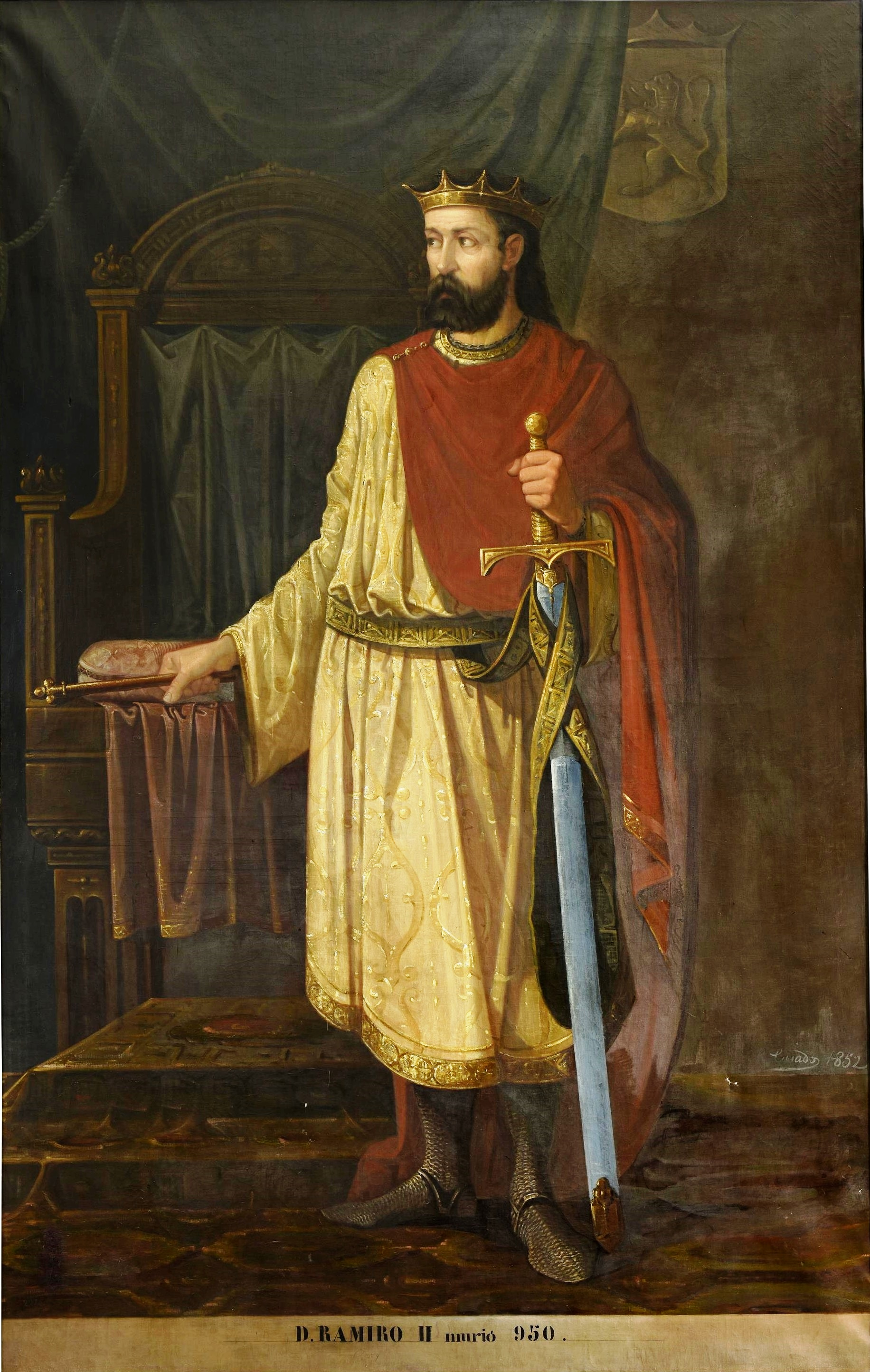 Retrato imaginario del rey Ramiro II de León (c.898-951). Fue hijo del rey Ordoño II de León y de la reina Elvira Menéndez. Luchó contra los musulmanes y derrotó a las huestes del califa omeya Abderramán IIIen la batalla de Simancas, librada en el año 939.